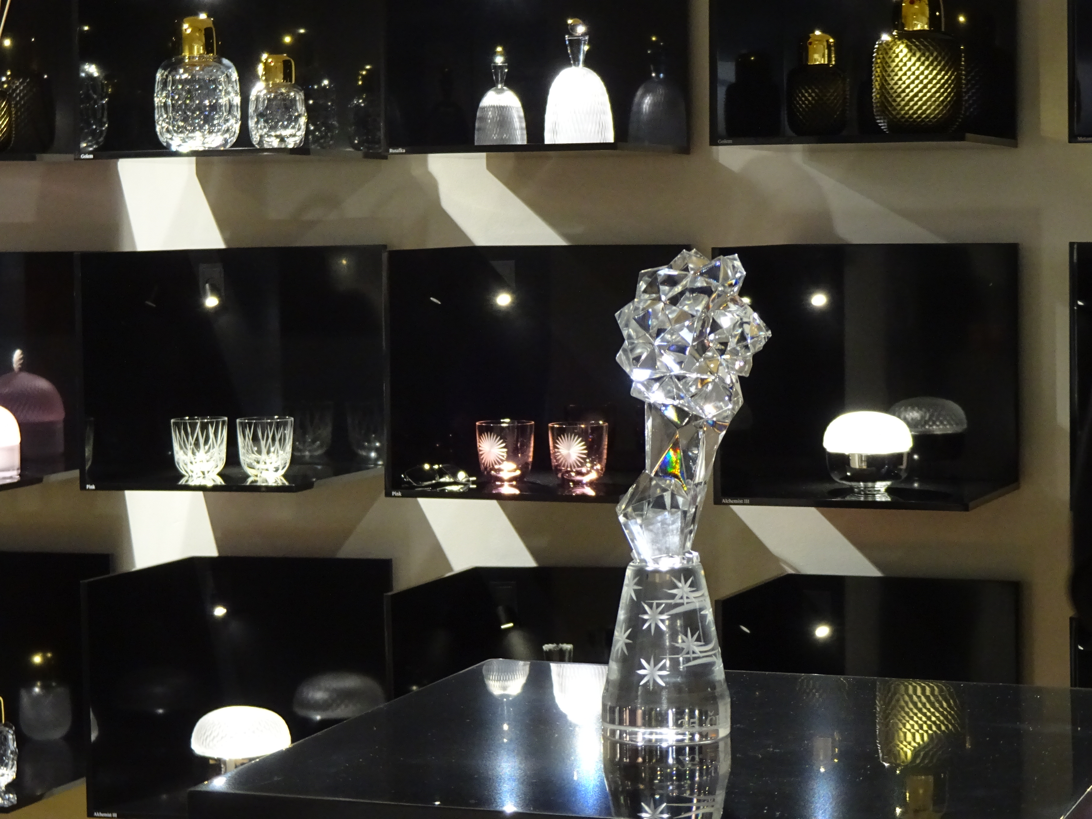 Fotky z odhalení sošky Českého lva 2017. Autor: Lucie Borová (Emma Orphe) pro Kritiky.cz